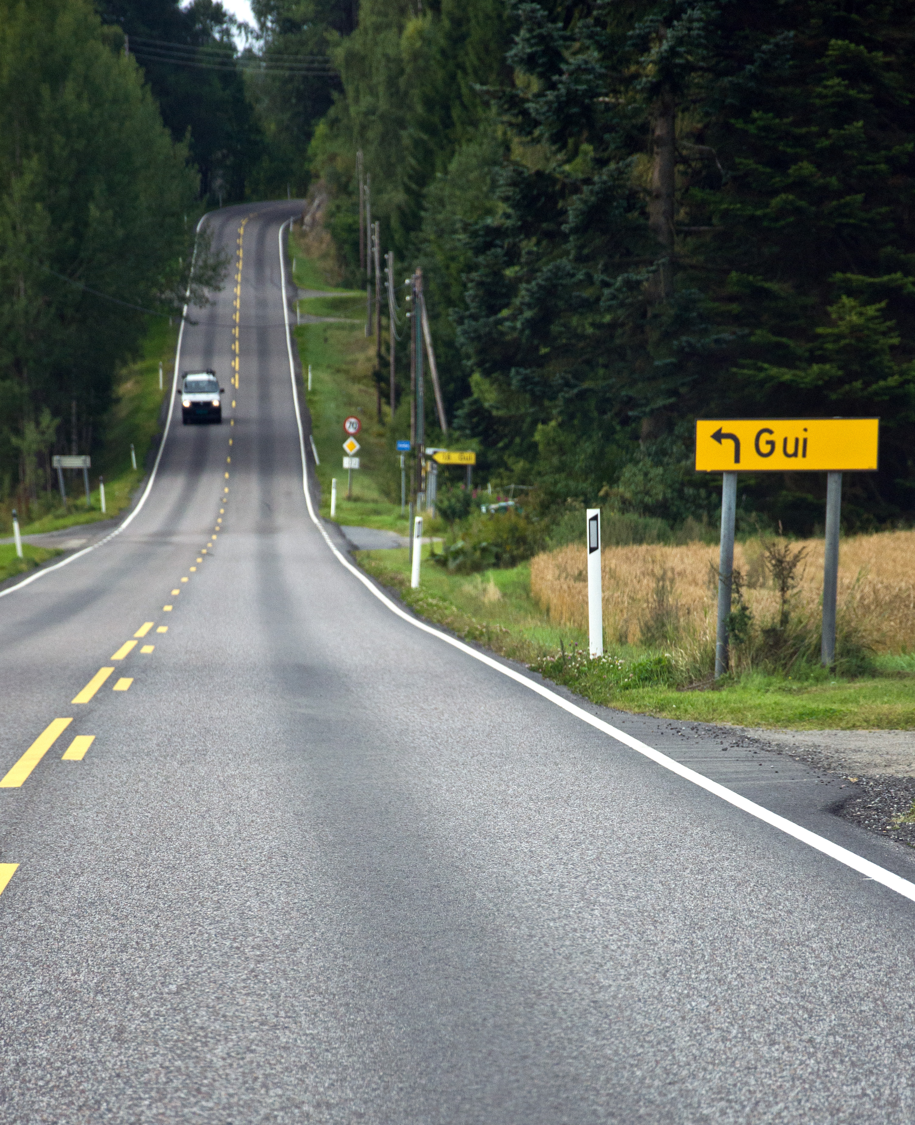 Fylkesvei 302 ved avkjøring Gui, i Larvik kommune i Vestfold